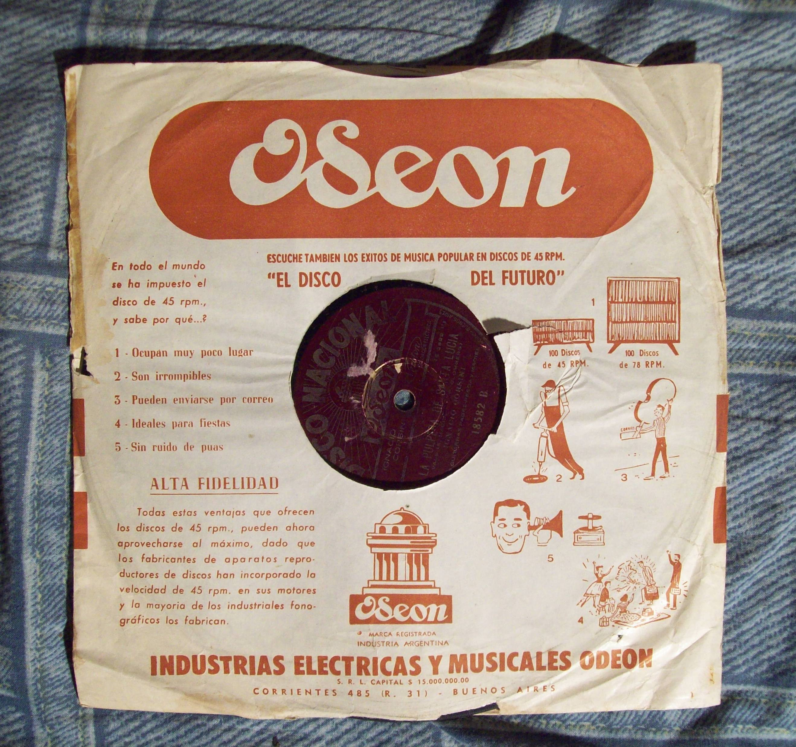 Sobre de un disco de pasta de 78 RPM anunciando el nuevo formato de 45 RPM.